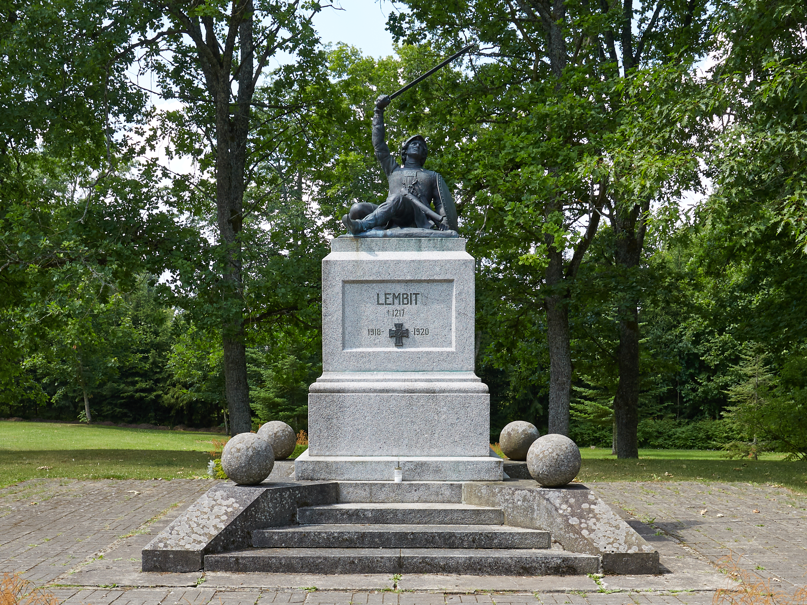 Suure-Jaani Vabadussõja mälestussammas